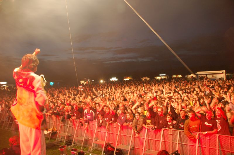 Sondaschule live bei Olga's Rock 2006, Blick von der Bühne auf das Publikum, im Vordergrund Sänger Costa Cannabis